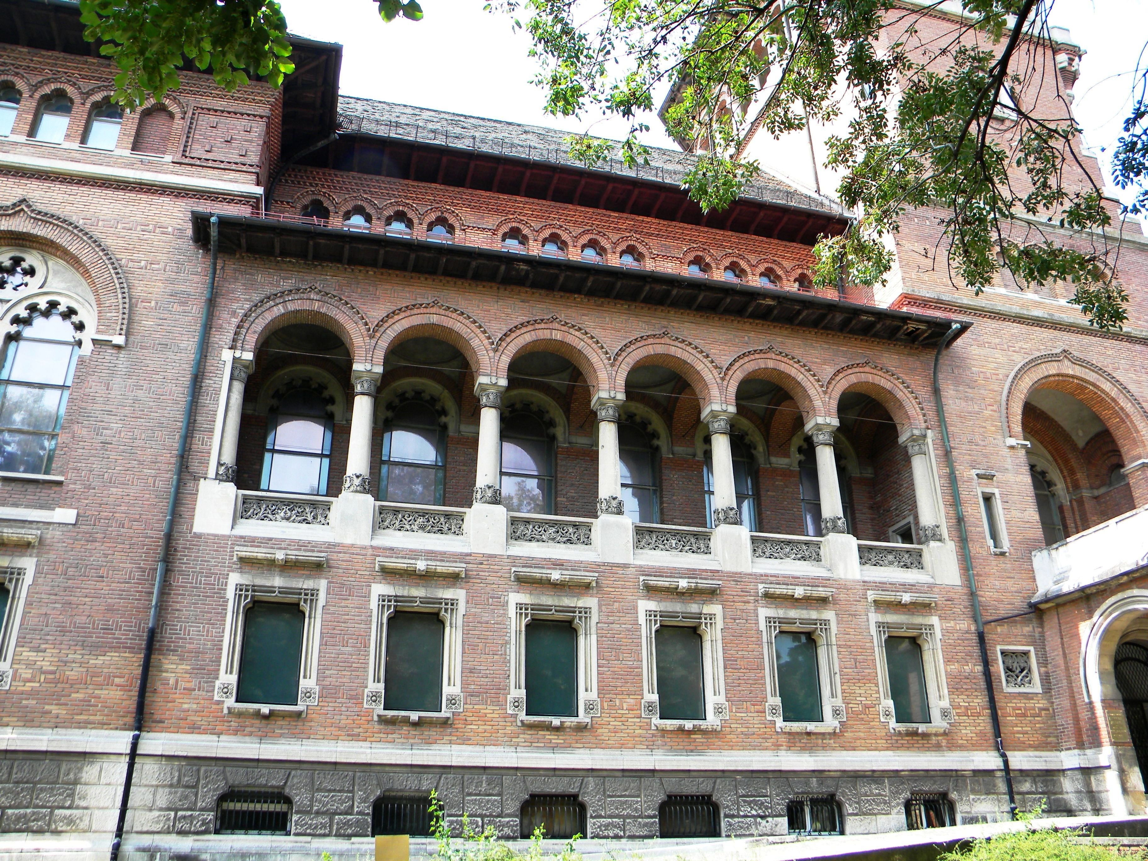 Muzeul Taranului Roman, Bucuresti, sect. 1 (detaliu)